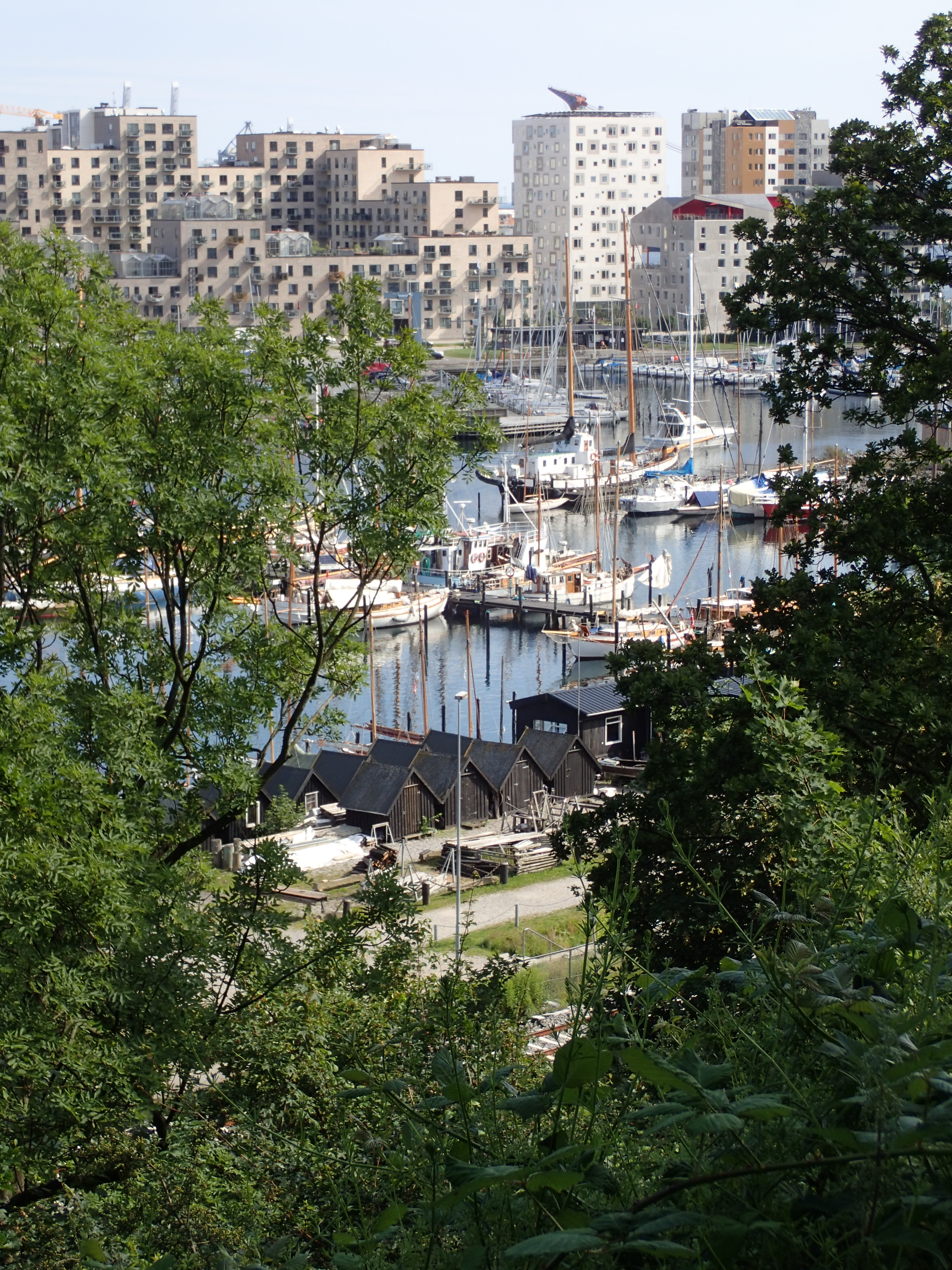 Aarhus Ø. Udsyn fra "Udsigten" i Riis Skov ved Skovtoften.